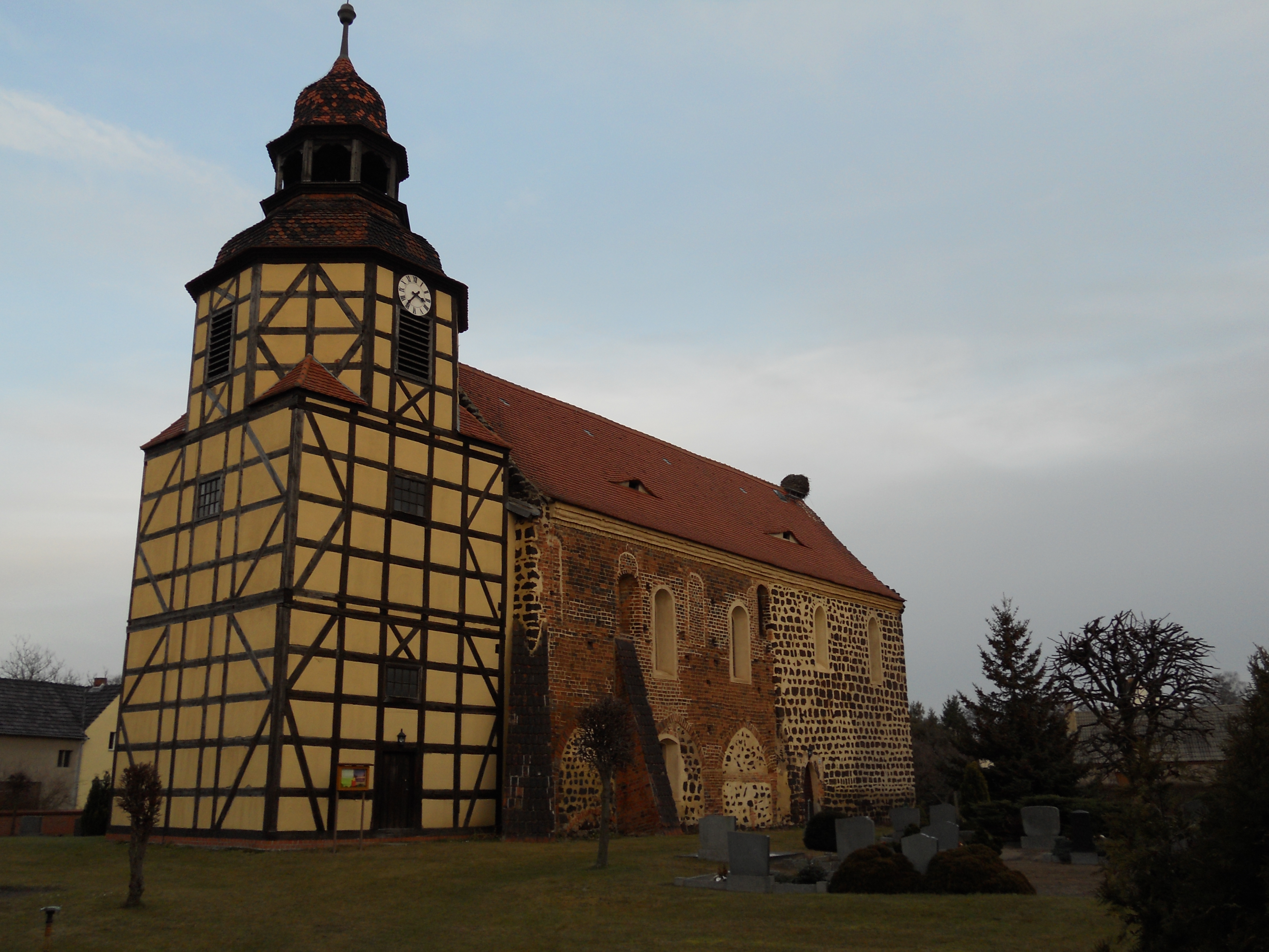 Die Kirche in Löben aus südwestlicher Richtung gesehen